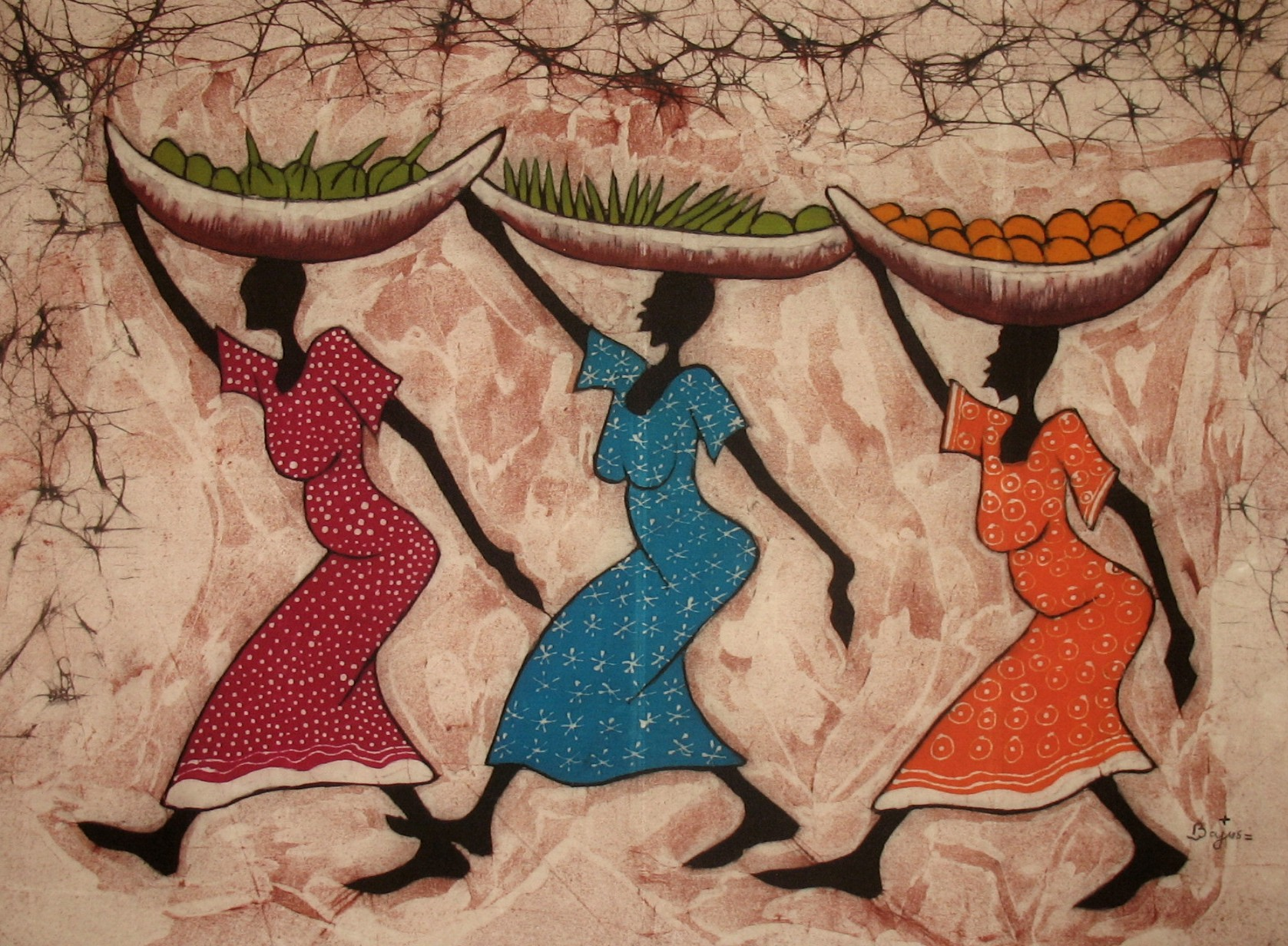 Canapo di artigianato africano raffigurante tre figure femminili con canestro sul capo